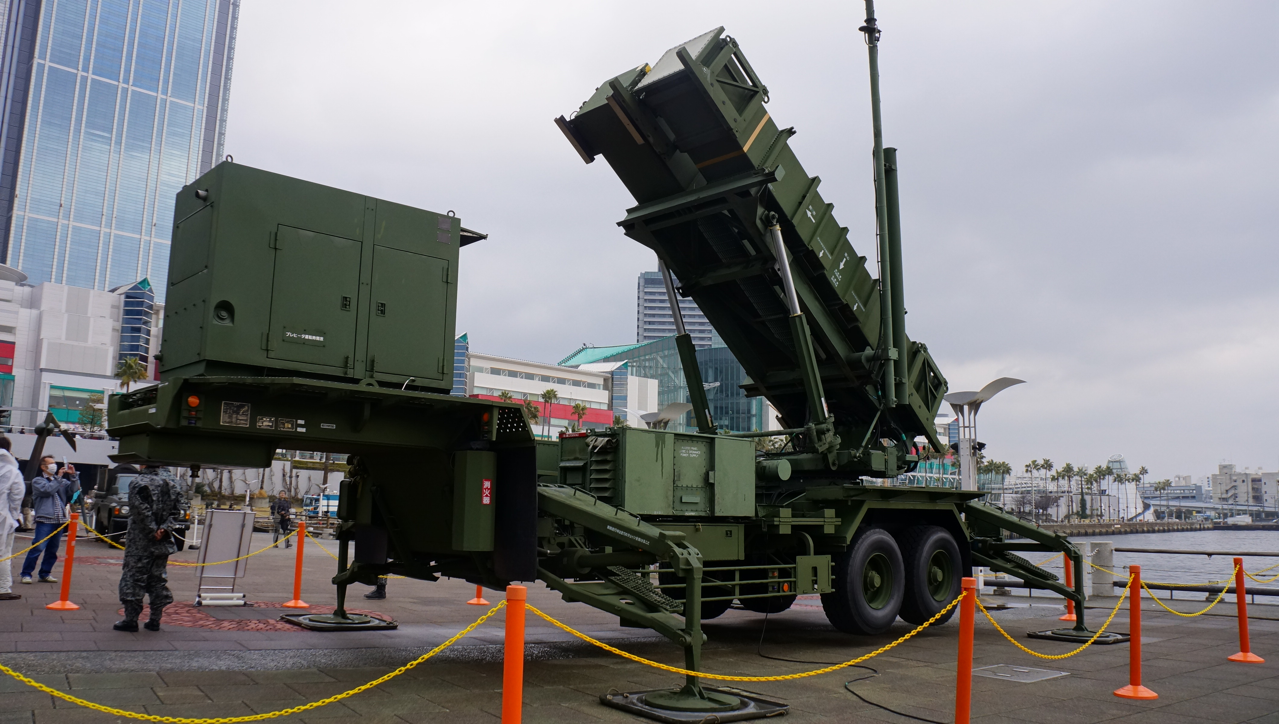 航空自衛隊 パトリオットミサイルPAC-3 発射装置。 13年3月10日 大阪ATCにて。